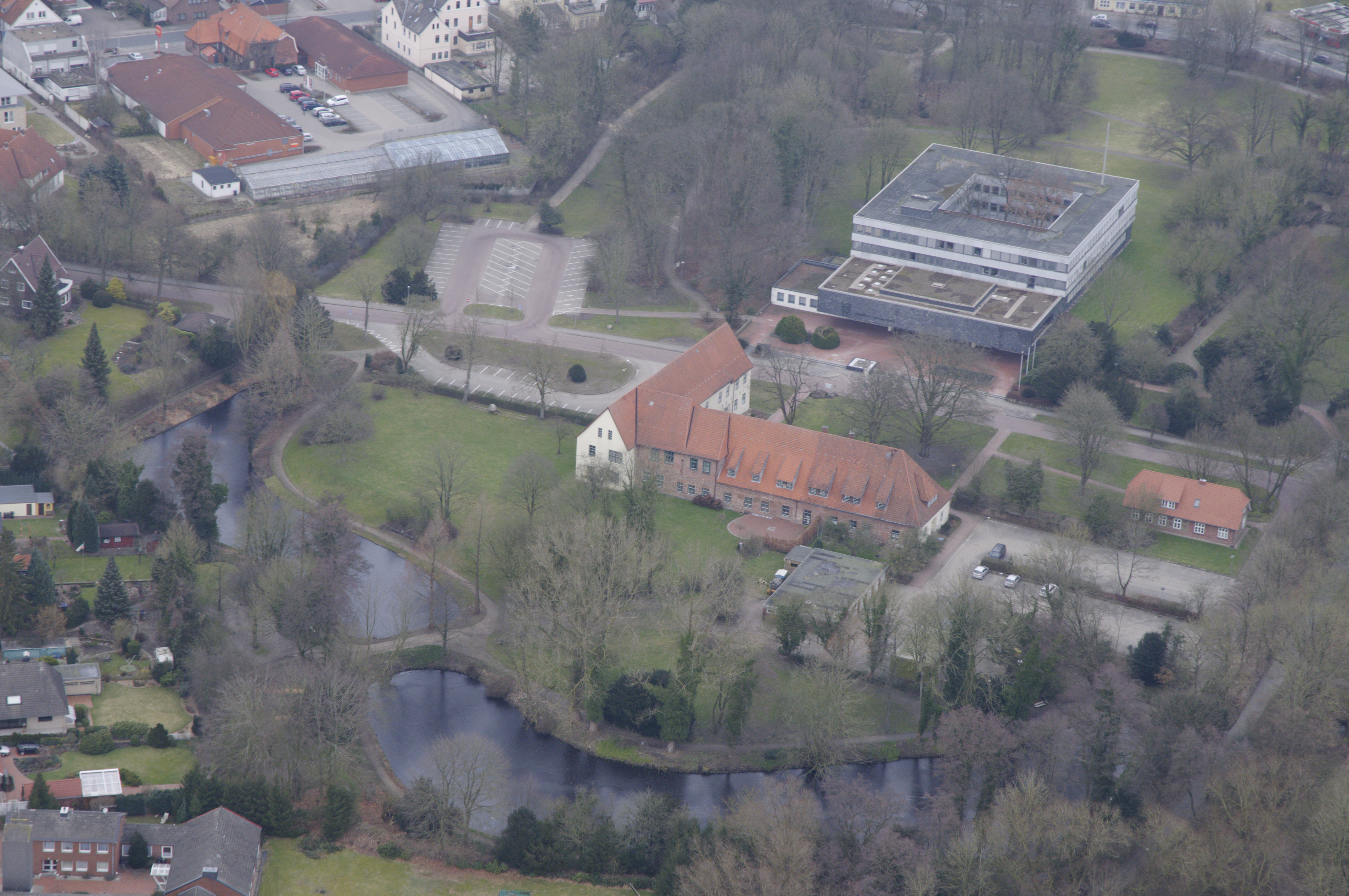 Bremervörde